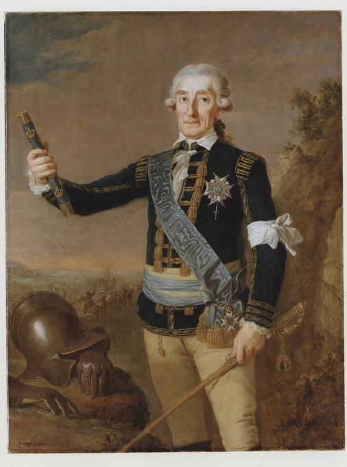 Johan August Meijerfeldt, svensk, Född 1725-05-04, Död 1800-04-21